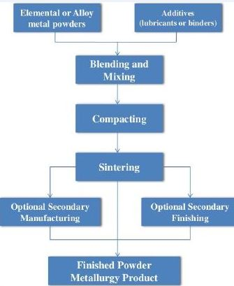 زینتر